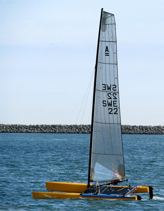 En A-Cat Katamaran i Ystad 2010.